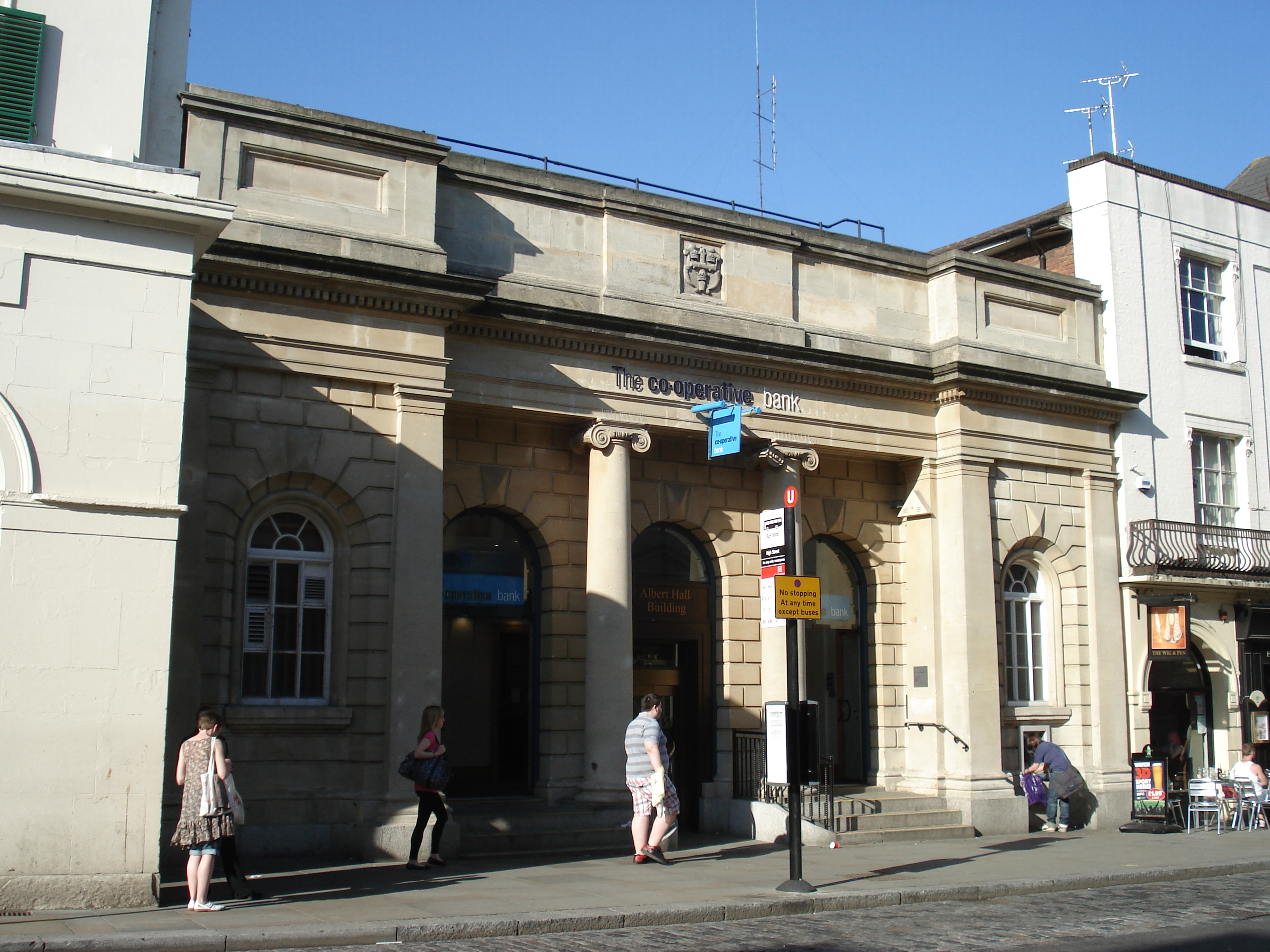 Colchester, UK